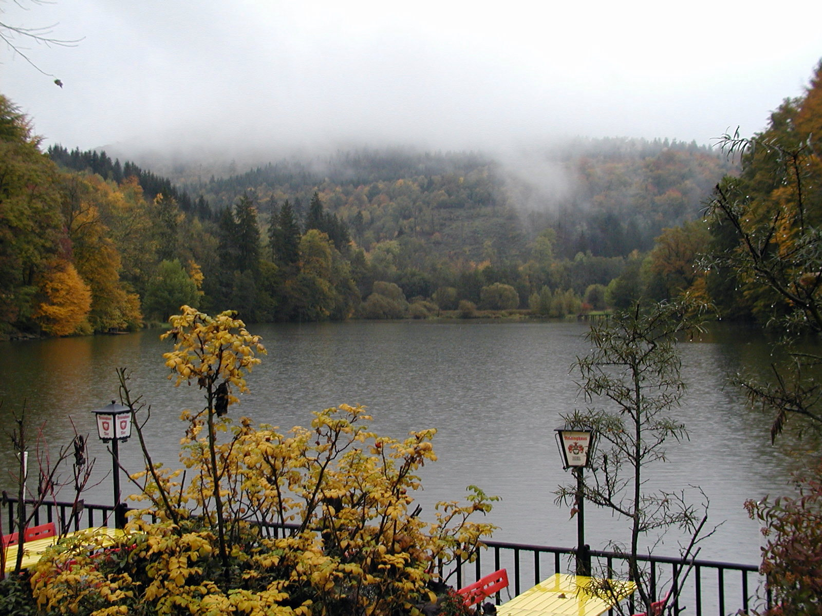 Thalersee im Herbst mit der Terrasse des alten Restaurants